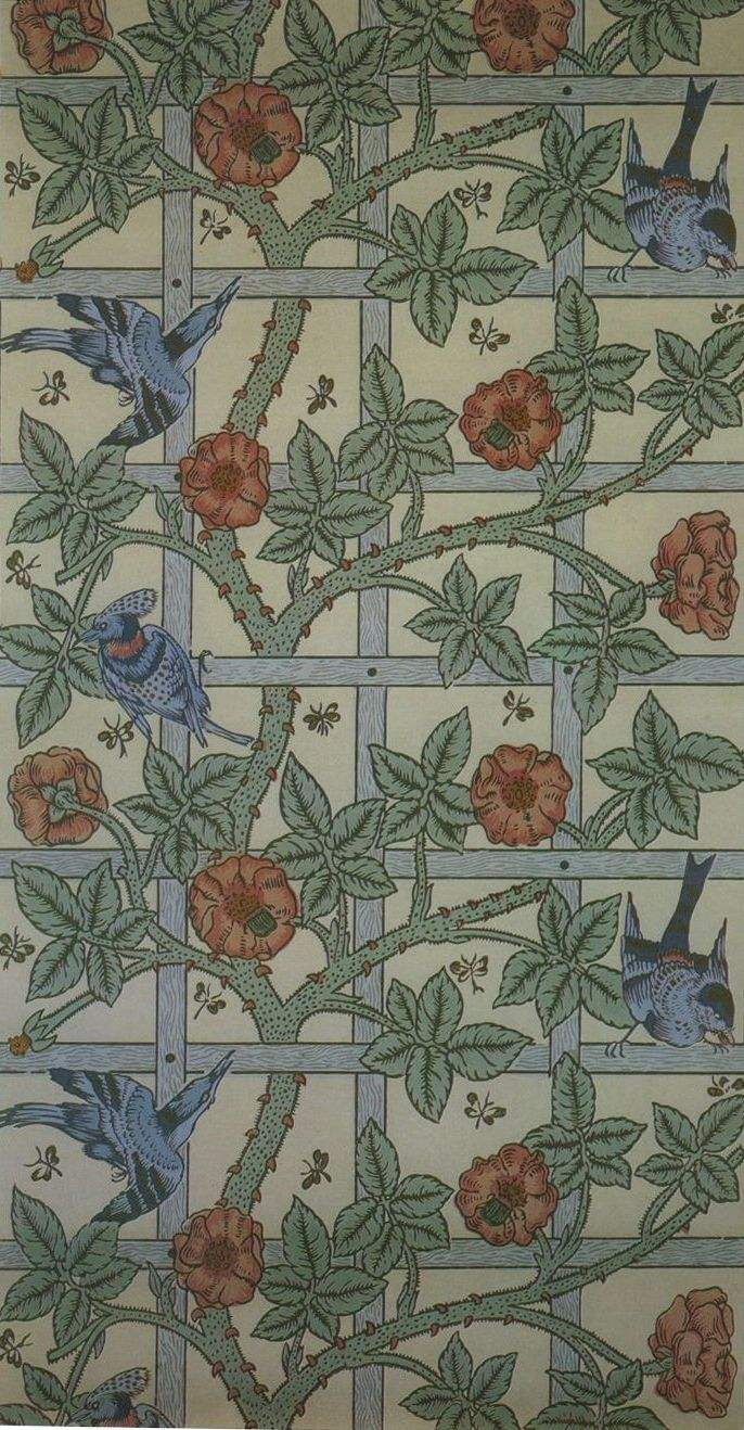 Trellis Wallpaper design plm 1864 Iets verbeterde versie (qua uitsnede etc)